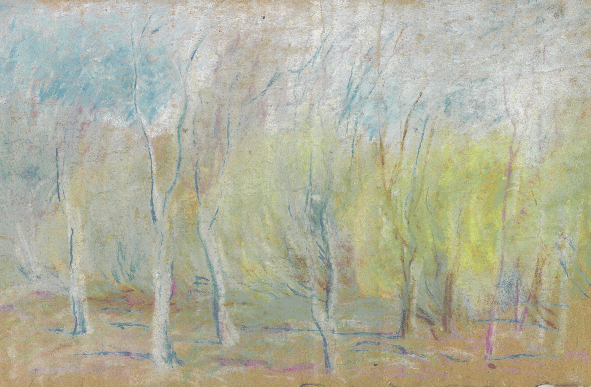 "Autumnal grove 1". Media: Pastel. Size: 12X18,3